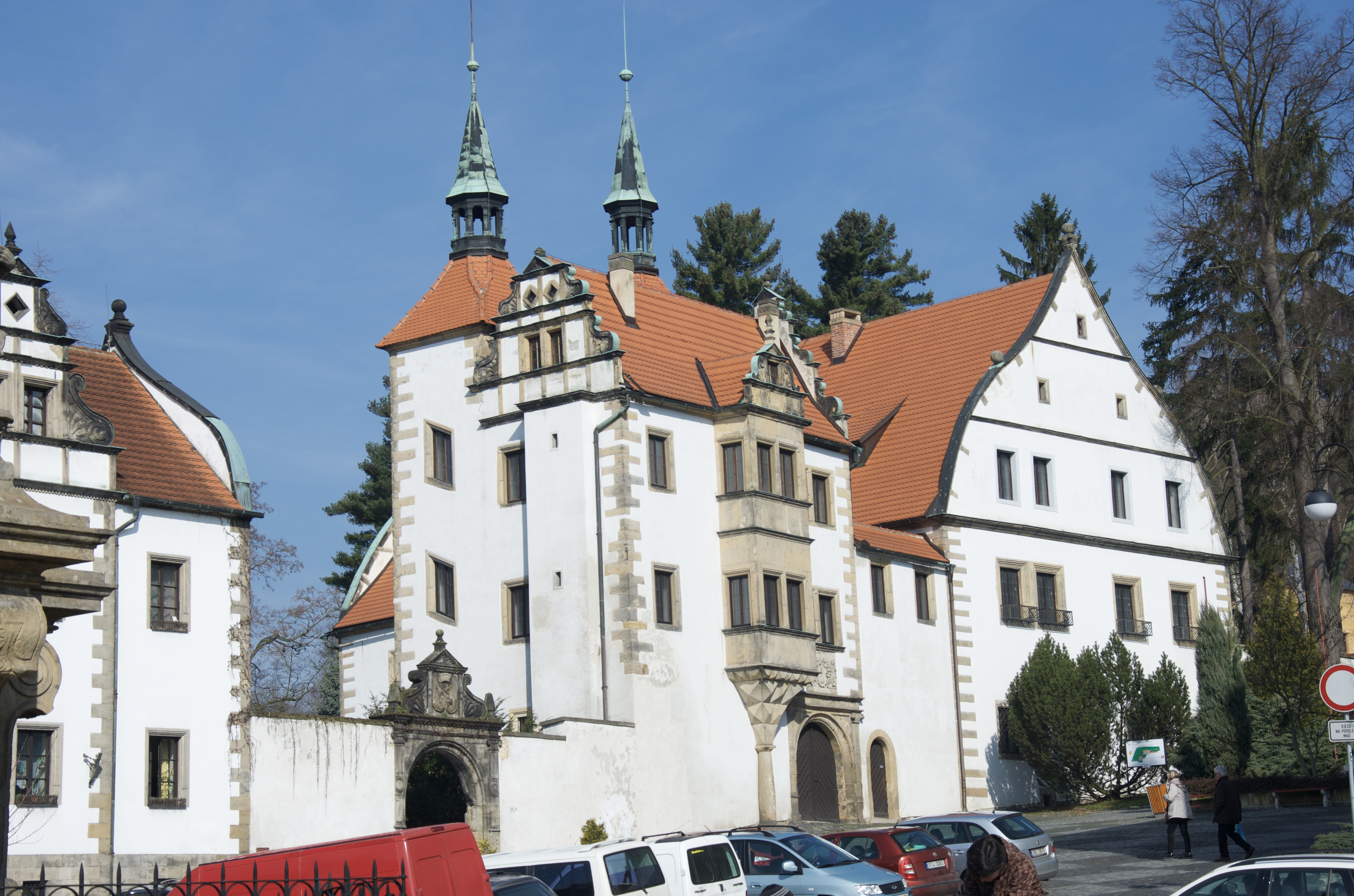 Pohled na východní průčelí dolního zámku a wolfova křídla